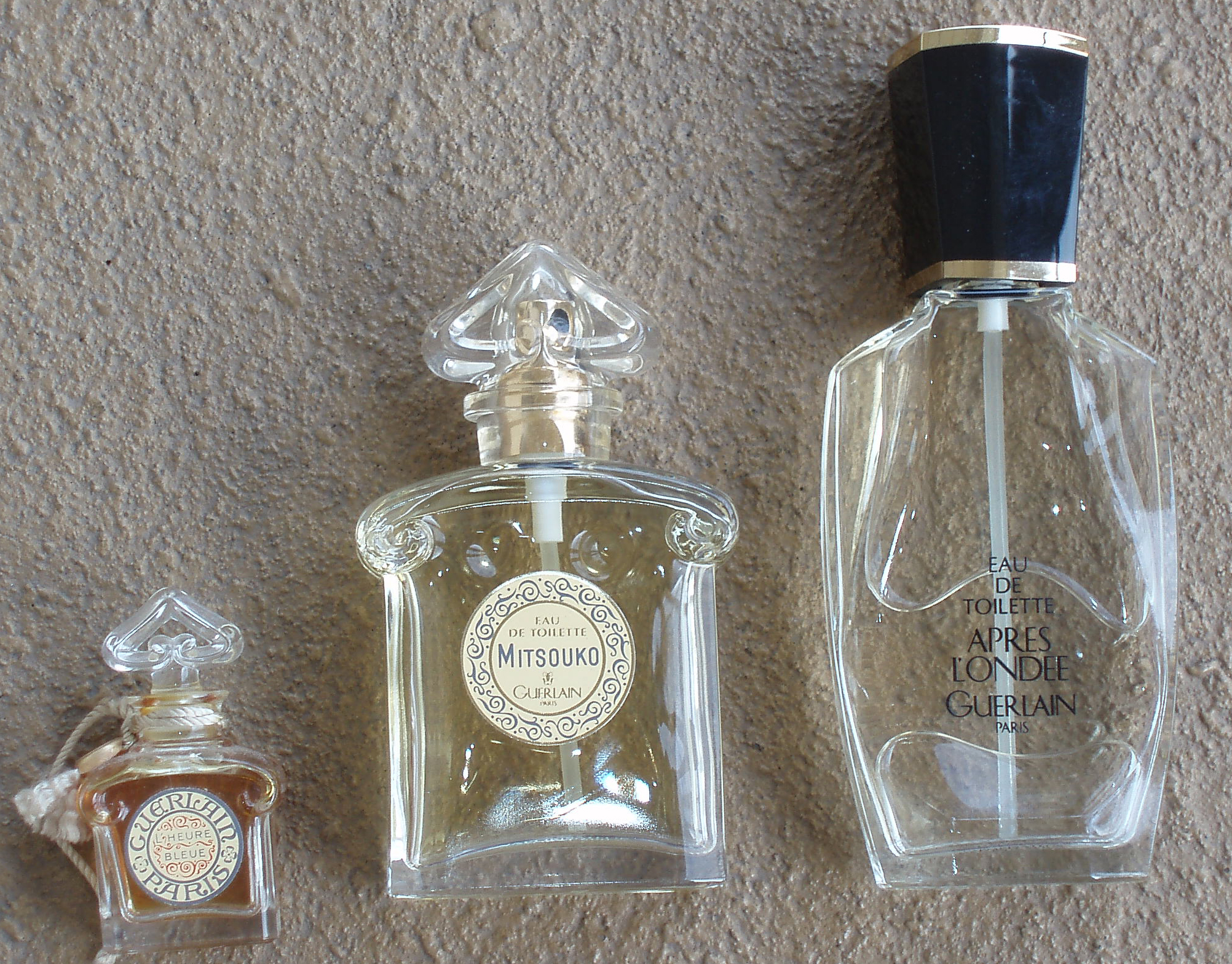 L'Heure Bleue, Mitsouko, Apres L'Ondee